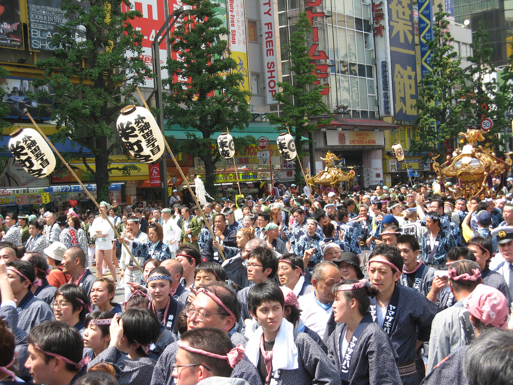 Matsuri Japan